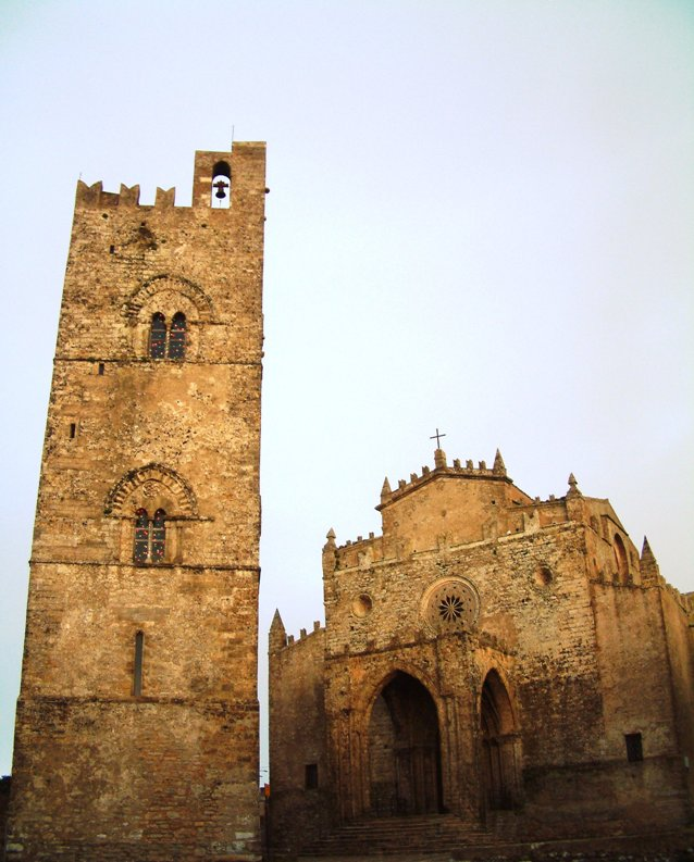 Església de Erice (Itàlia).